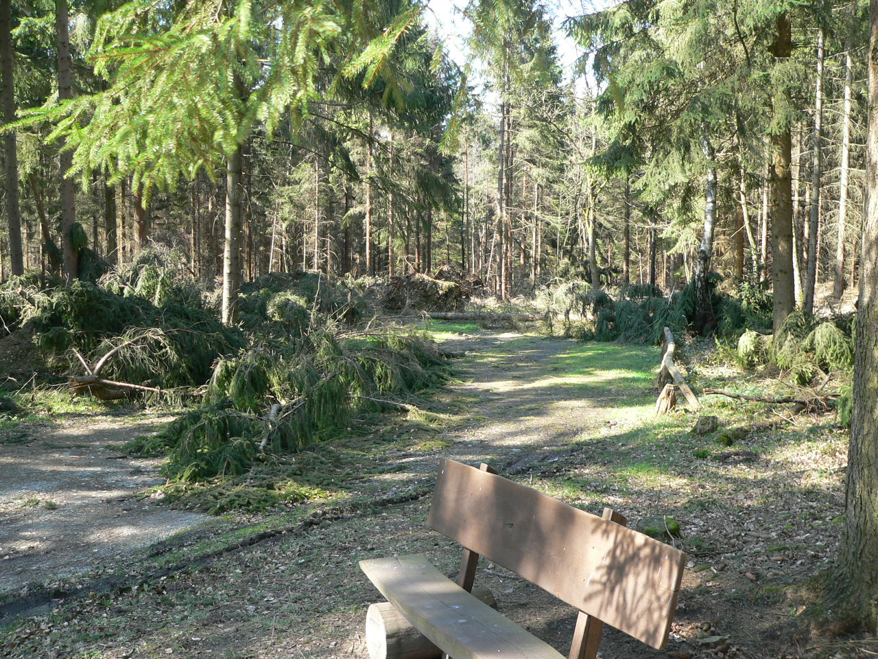 Sturmschäden durch Orkan Kyrill (2007-01-18) im Bramwald